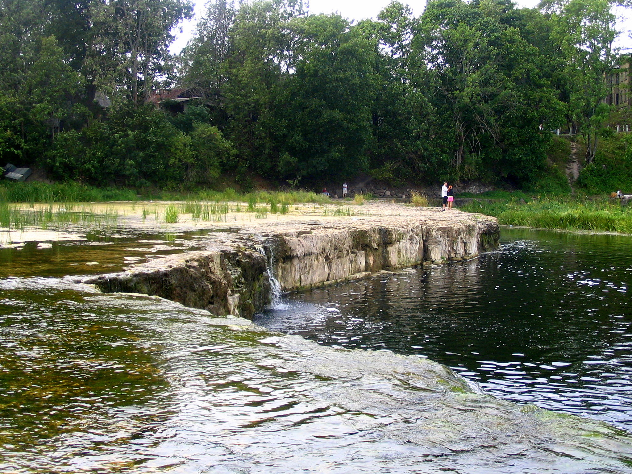 Waterfall Ventas Rumba